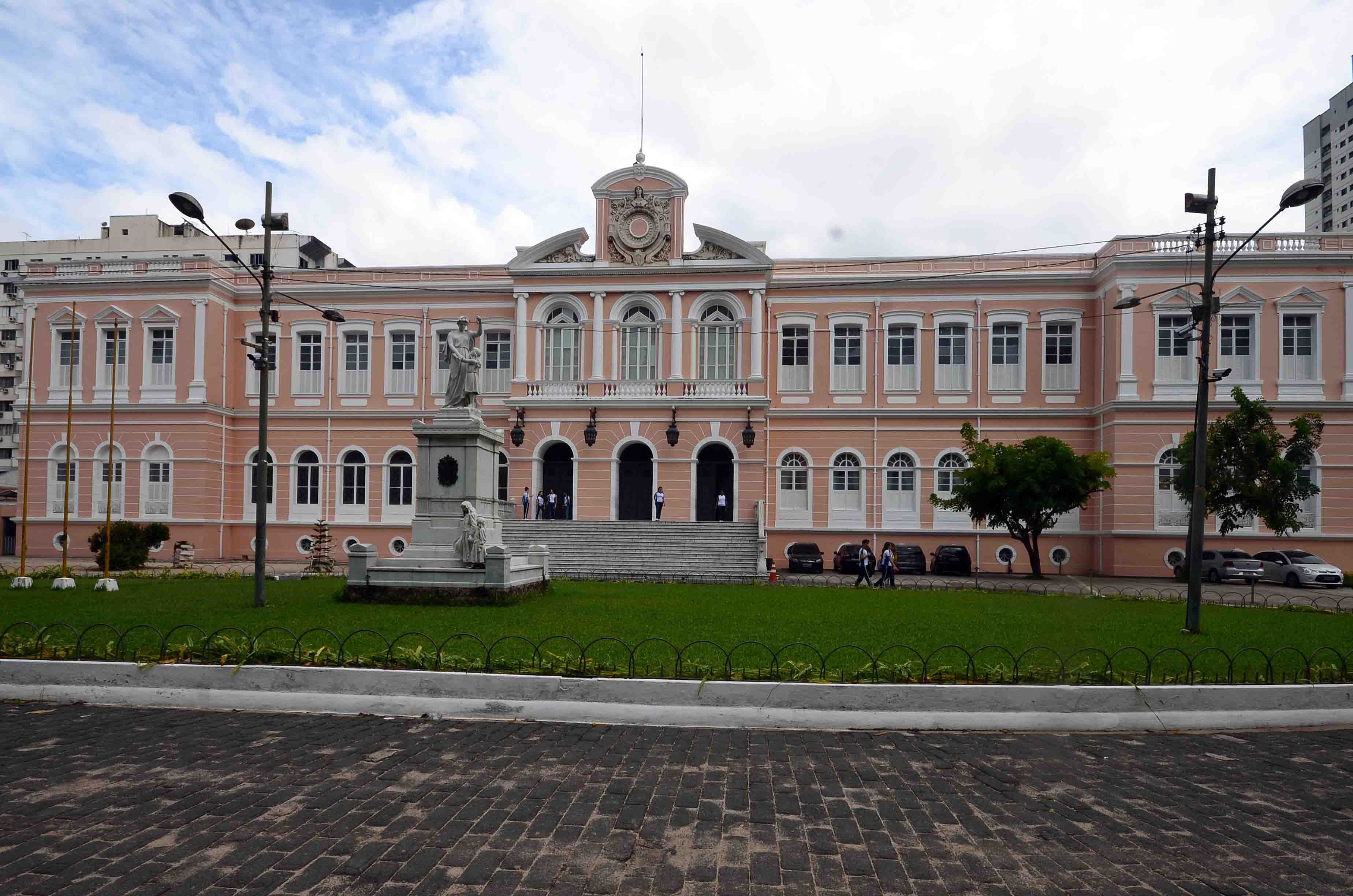 Colégio Gentil Bittencourt - Nazaré - Belém - Pará